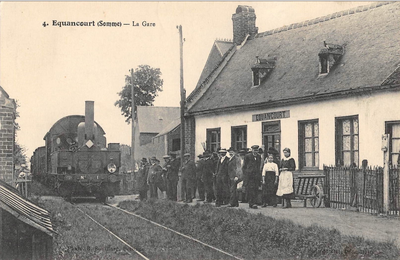 La gare d'Equancourt vers 1910.